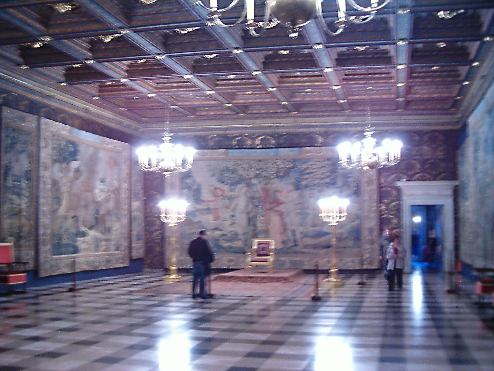 Sala Senatorska w Zamku Królewskim na Wawelu